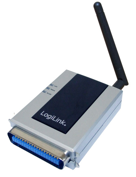 Small Printserver/Druckerserver